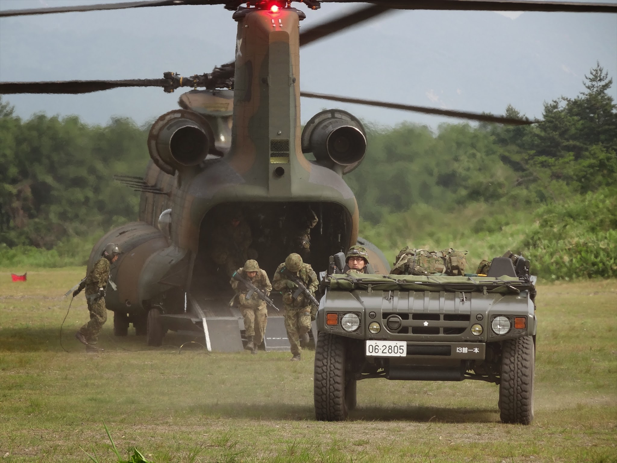 ＣＨ－４７ＪＡ（第１２ヘリコプター隊）